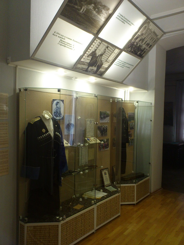 Зал "Казачество" в Ессентукском историко-краеведческом музее